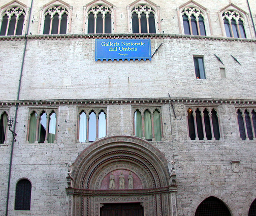 Perugia (Italy), Palazzo dei Priori, sede della Galleria nazionale dell'Umbria